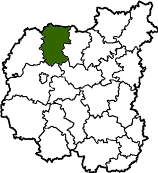 Gorodnyanskyi-Raion map